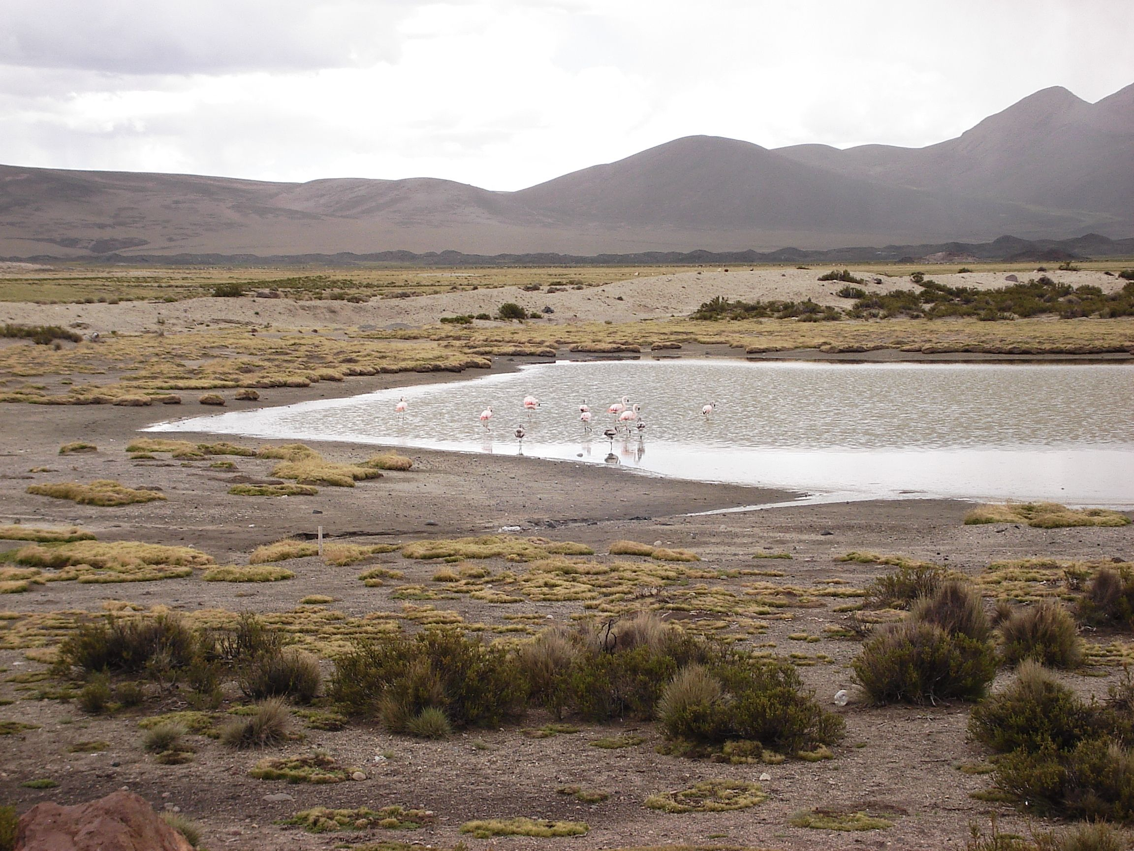 Foto tirada por mim, em Arica.